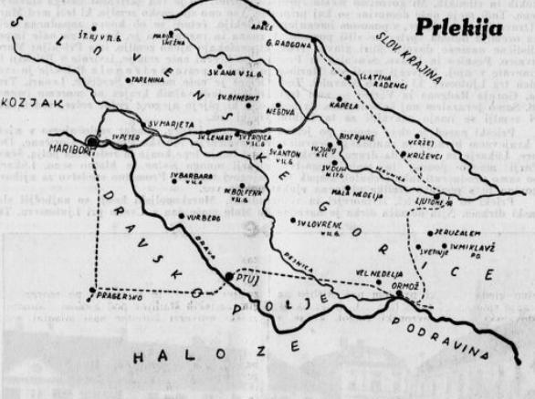 Zemljevid Prlekije.